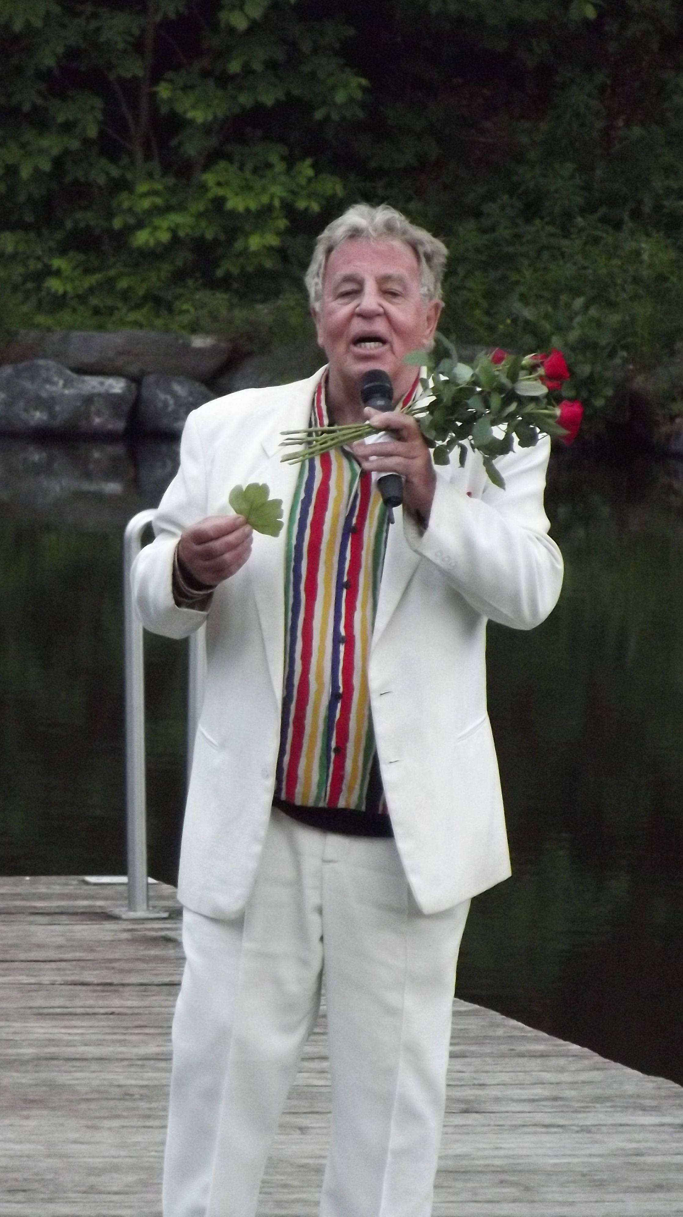 Erzähler der Nacht Nacht der Poesie